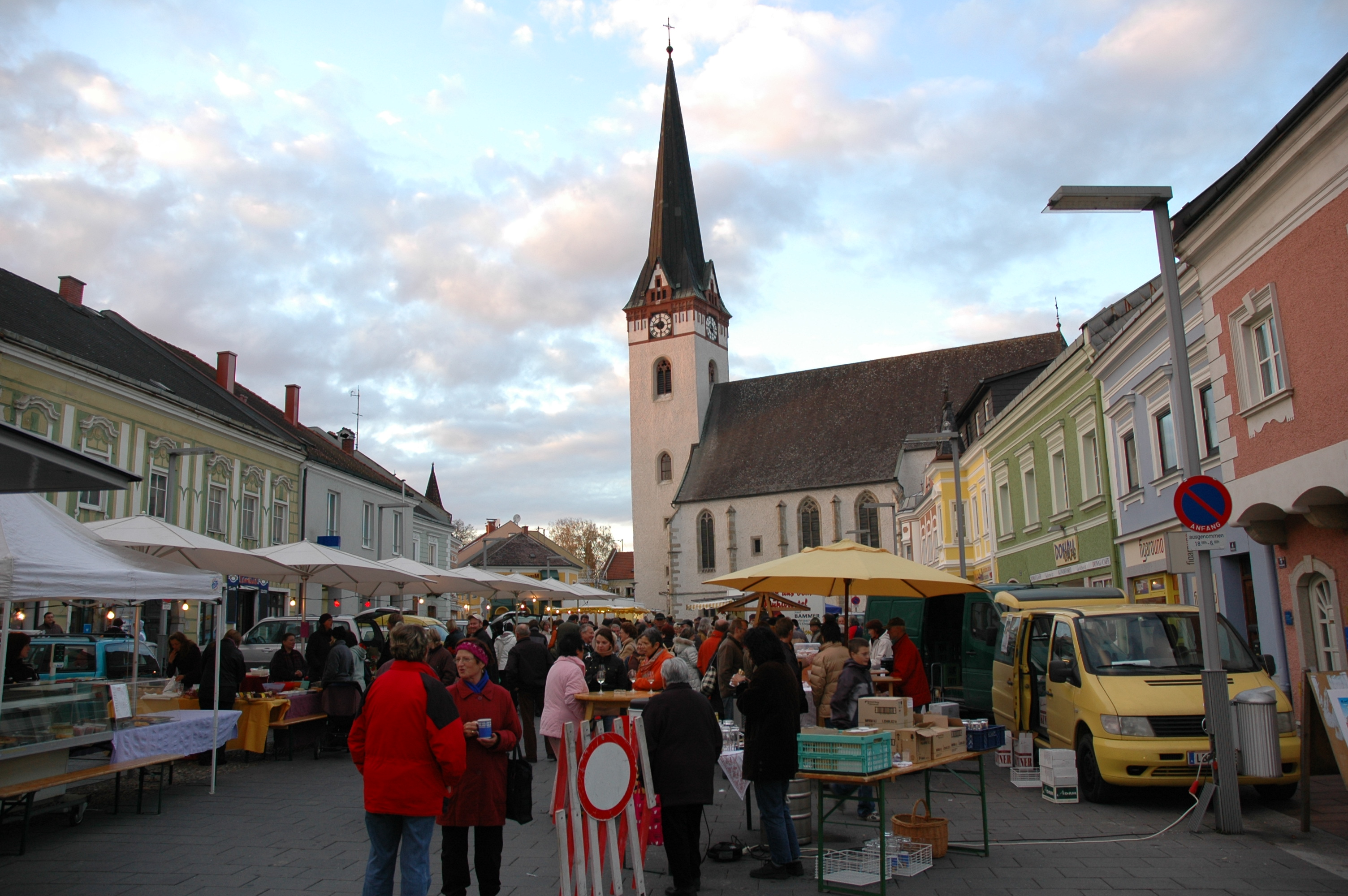 Wochenmarkt (Lebensmittel aus der Region) in Ottensheim, Österreich